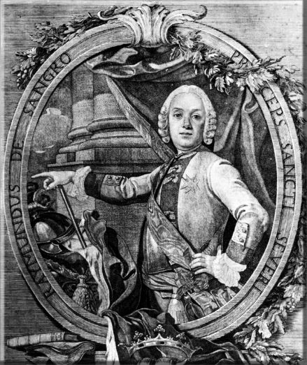 Raimondo di Sangro, Prinz von Sansevero (1710-1771), italienischer Aristokrat